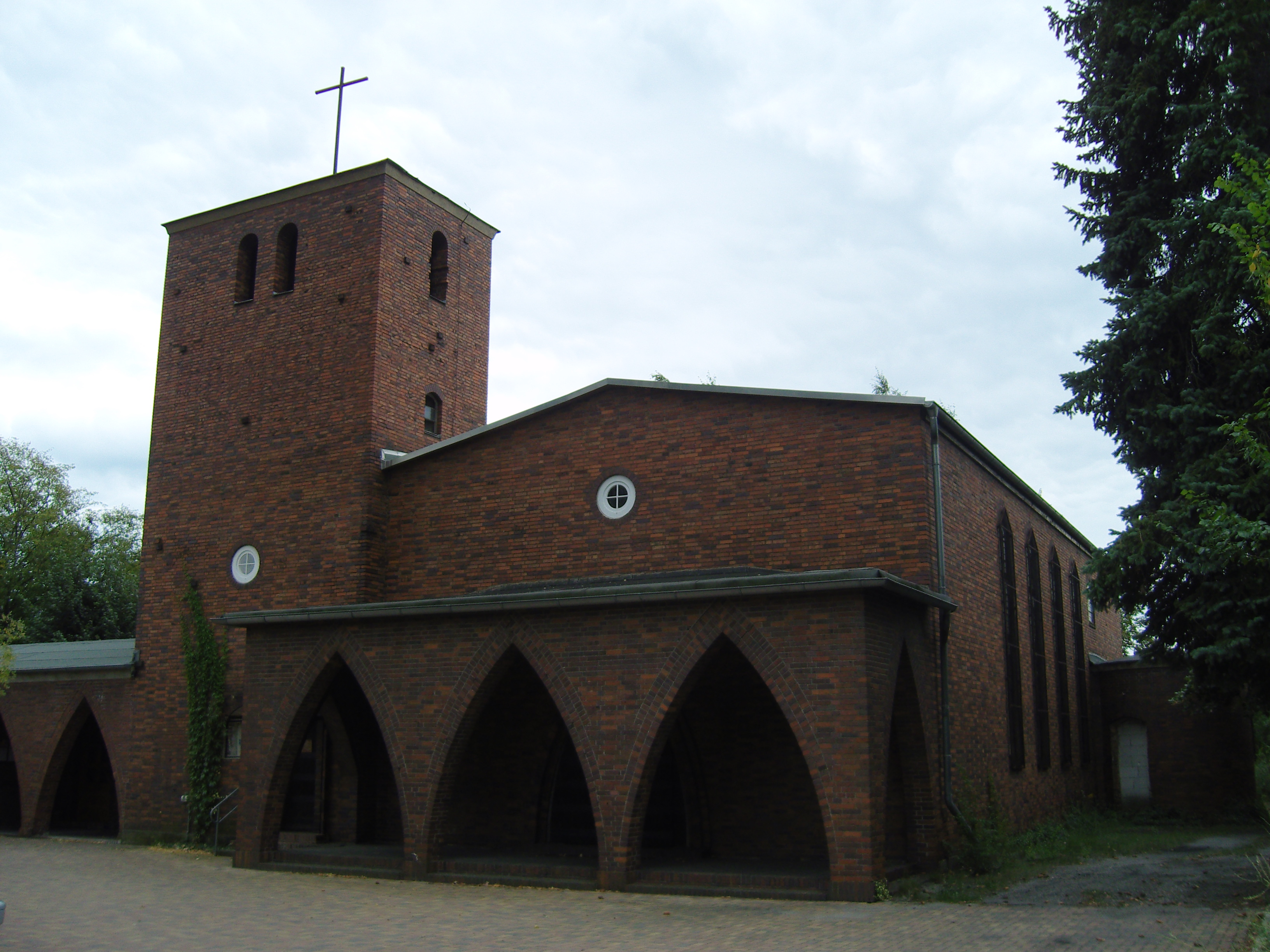 Heilandskirche in Hörlitz; Baudenkmal im Landkreis Oberspreewald-Lausitz